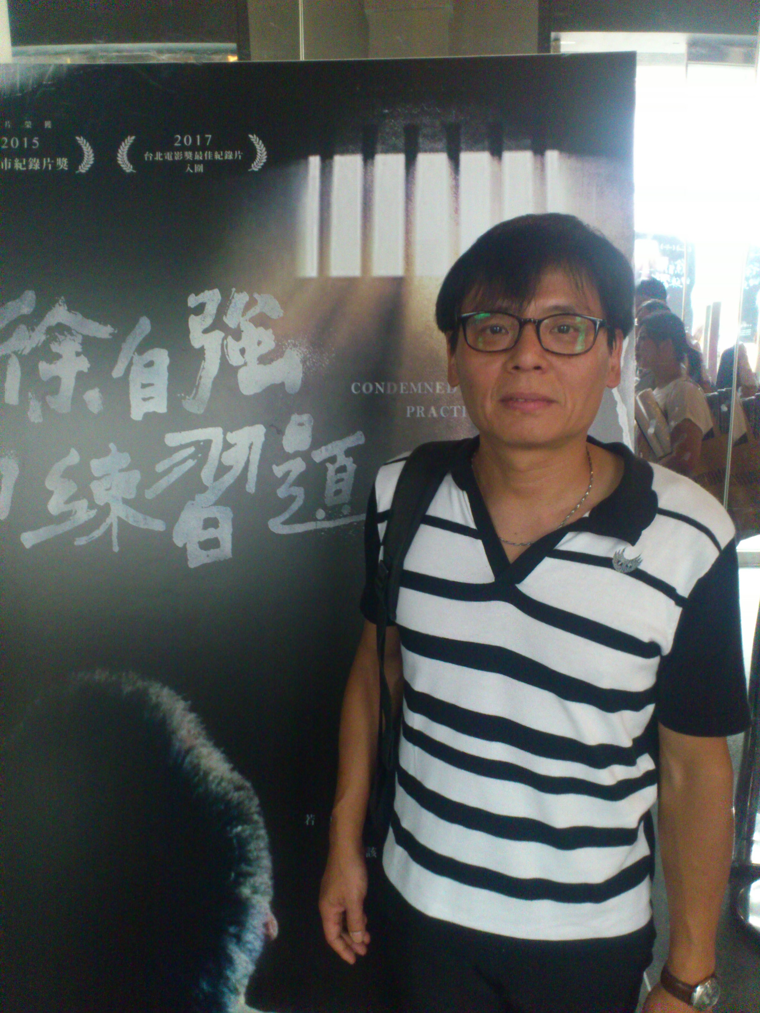 徐自強立於紀錄片《徐自強的練習題》海報前。